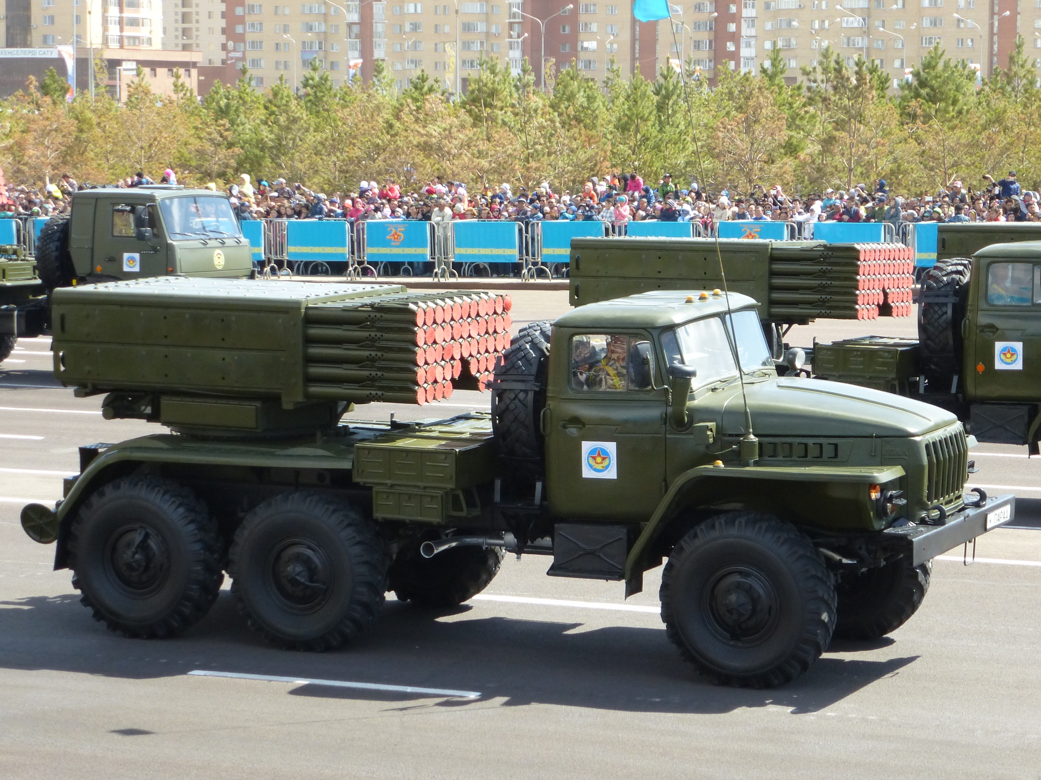 РСЗО 9К59 Прима. Военный парад в Астане. 07.05.2017